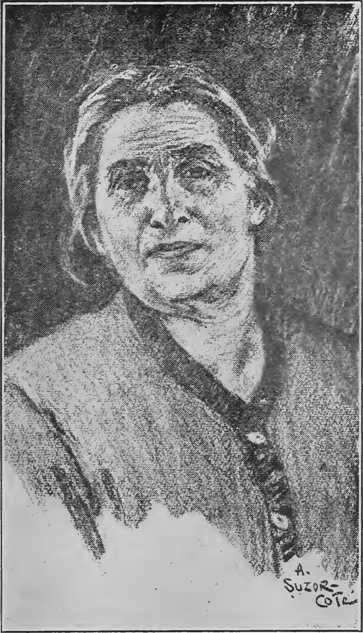 illustration du livre en djvu sur commons